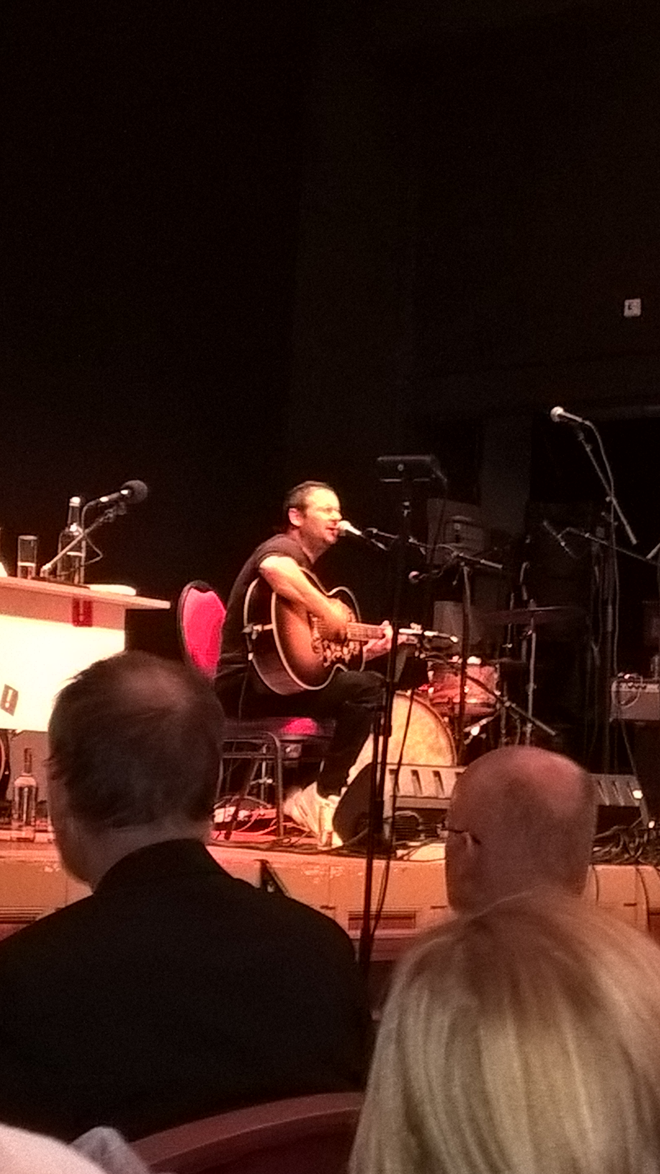 Novastar